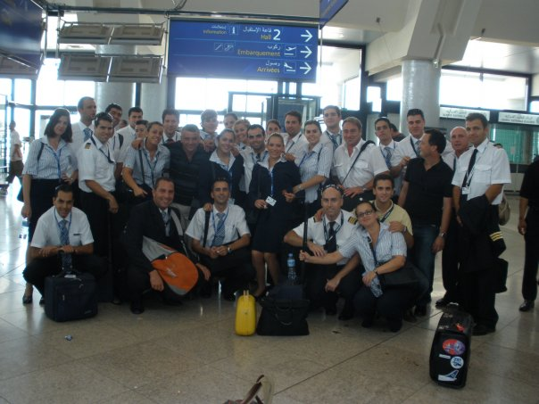 Adiós. Tripulantes Pilotos, Tripulantes de Cabina, y Técnicos de Mantenimiento y de Operaciones, de Flyant (división de pasaje) posan en el aeropuerto de Argel el 08 de septiembre de 2008, antes de su último vuelo, con el fin de regresar a España debido al repentino cese total de operaciones del Grupo Futura y su "suspensión de pagos".